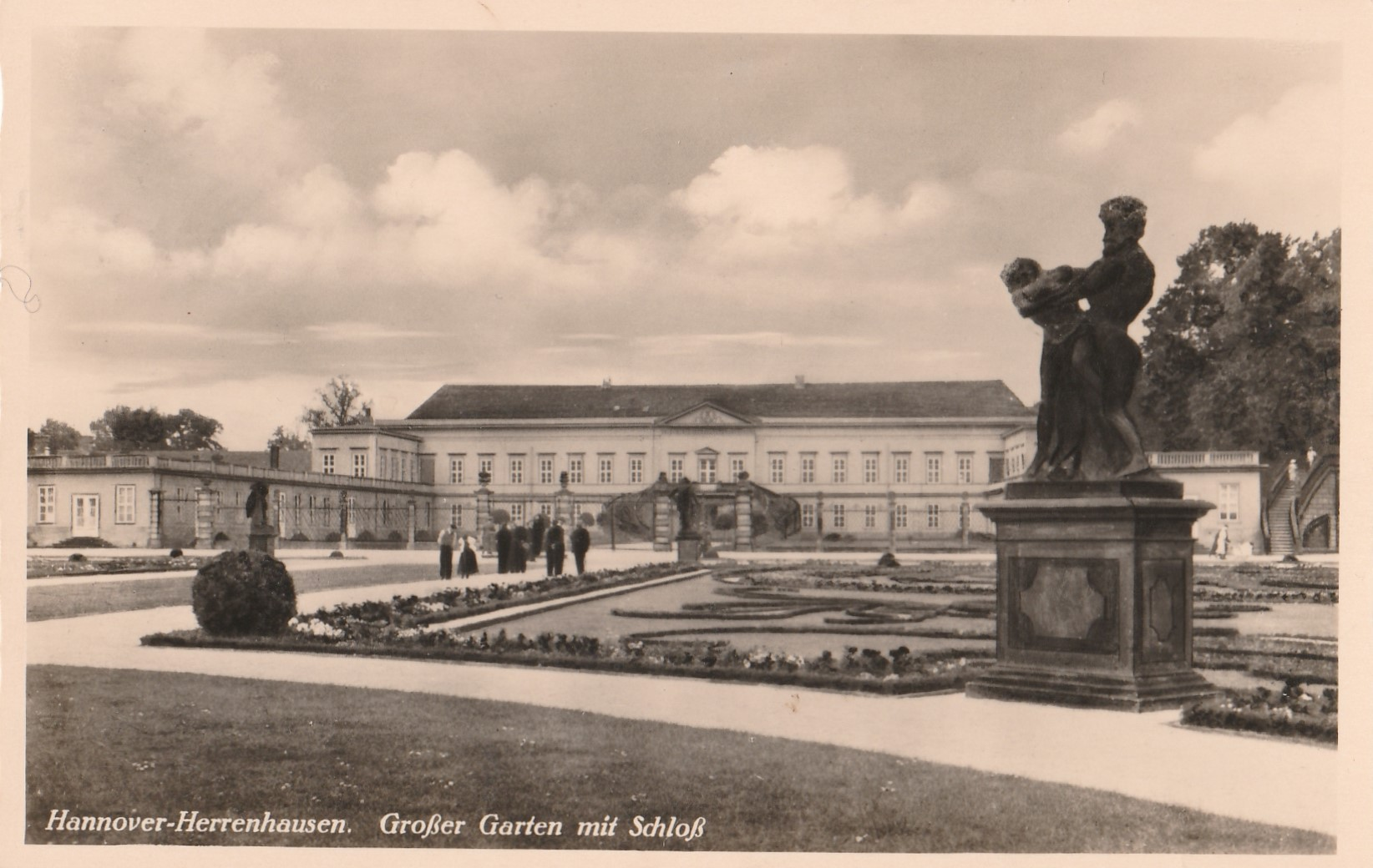 Ansichtskarte von Lotte Schrader an Musiklehrer Theodor Krüger, Celle. Abgestempelt am 05.08.1939.